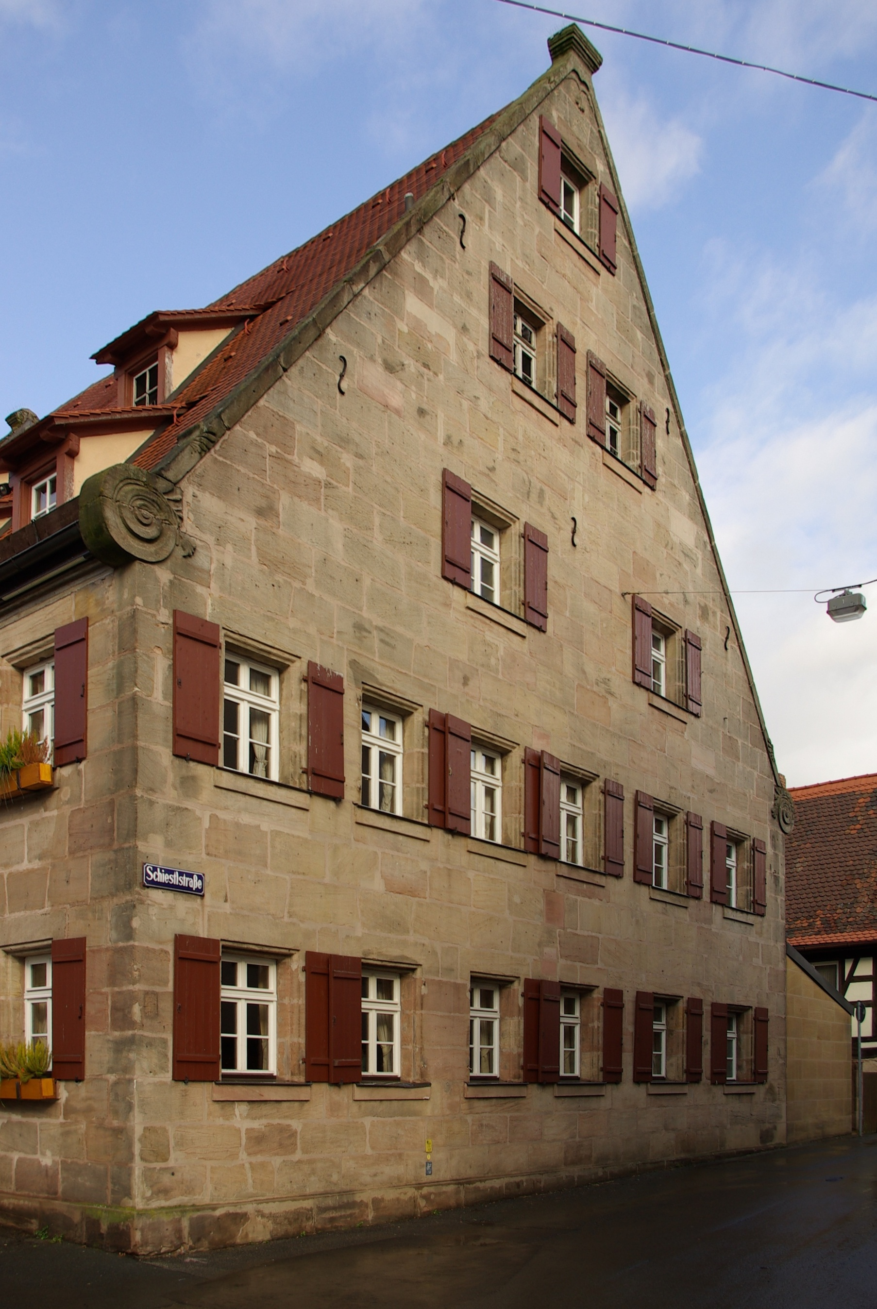 Kraftshof, Gasthaus Schwarzer Adler